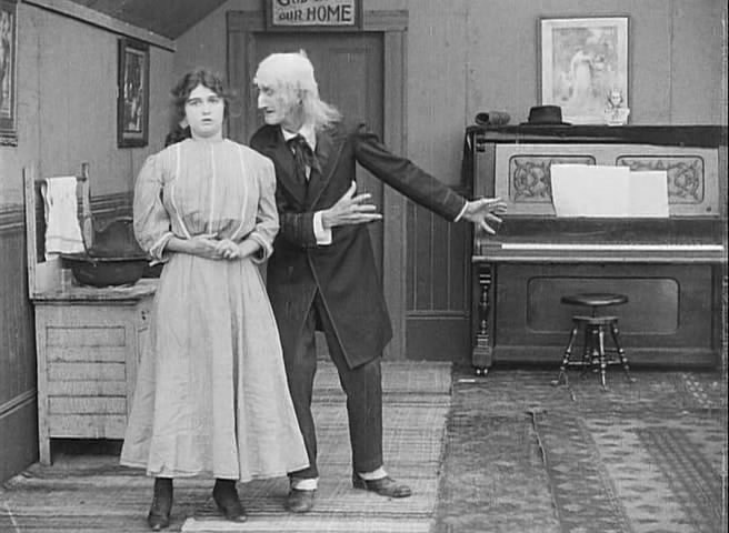 Helen Carruthers & Frank Hayes dans "Charlot déménage" (1914)